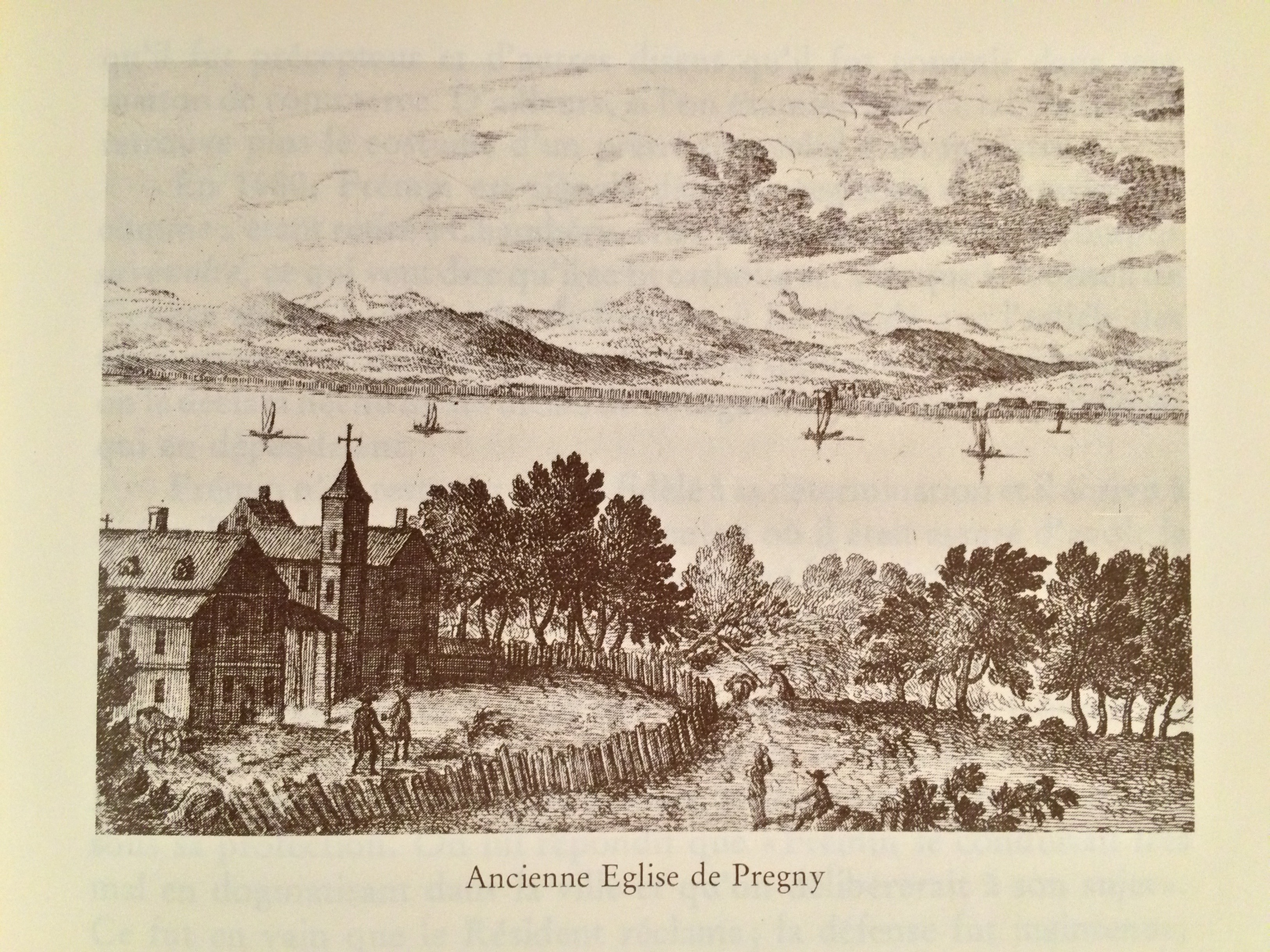 Gravure de l'ancienne église catholique de Pregny, dans la campagne genevoise.